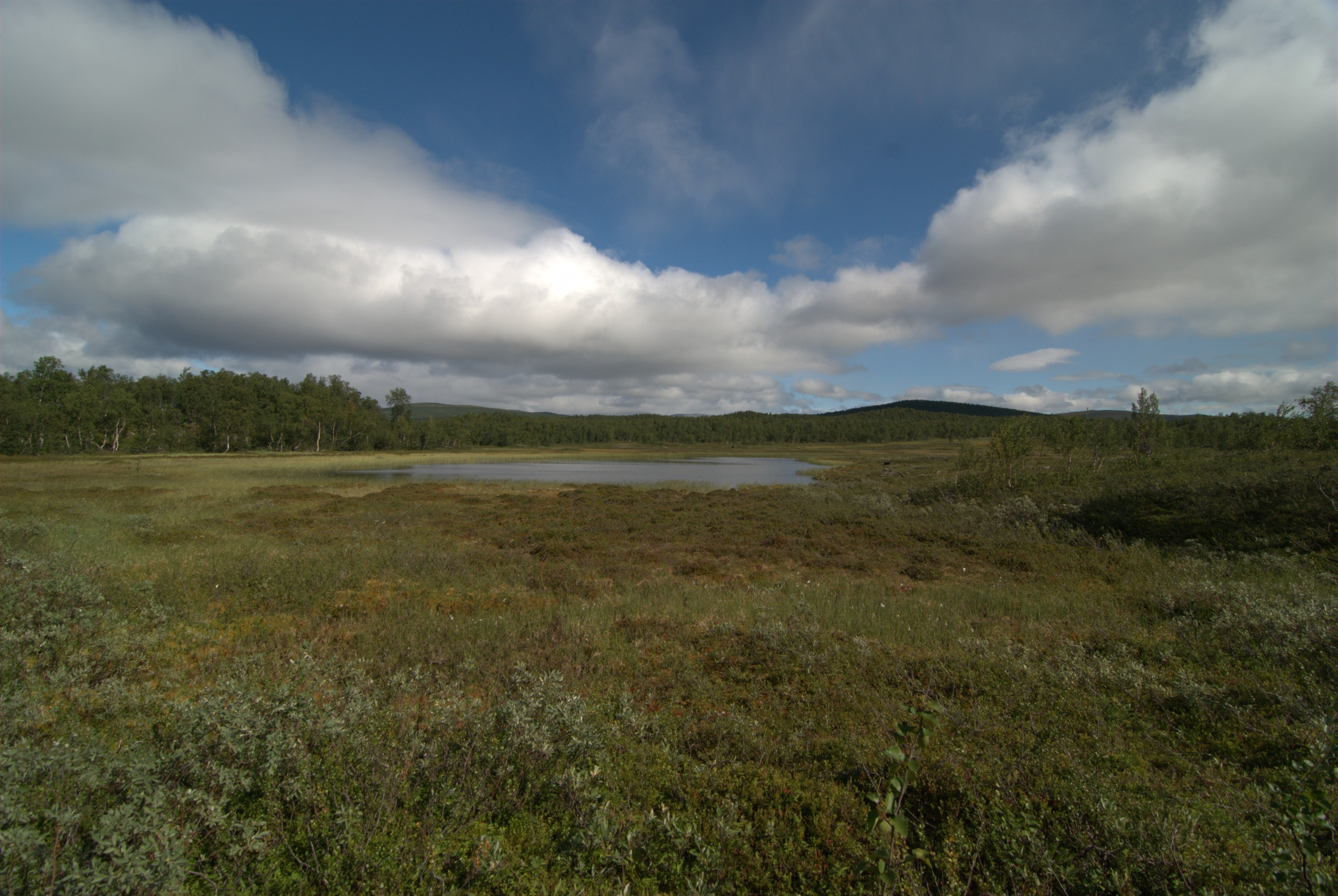 Wetlands in the Tärnasjön area, Vindelfjällen, seen from the Kungsleden trail.